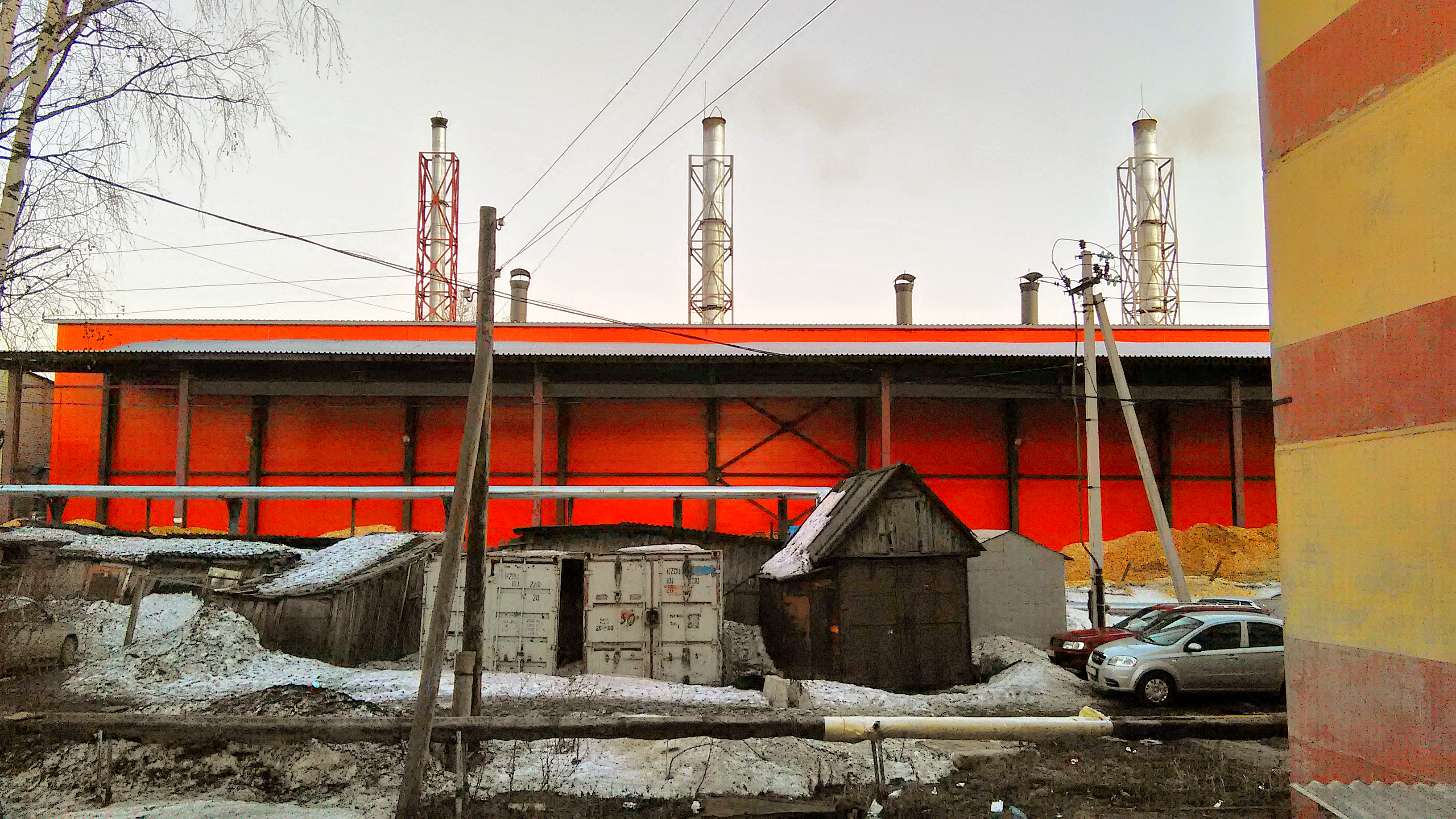 Вид на котельную возле Попугая — Шахунья